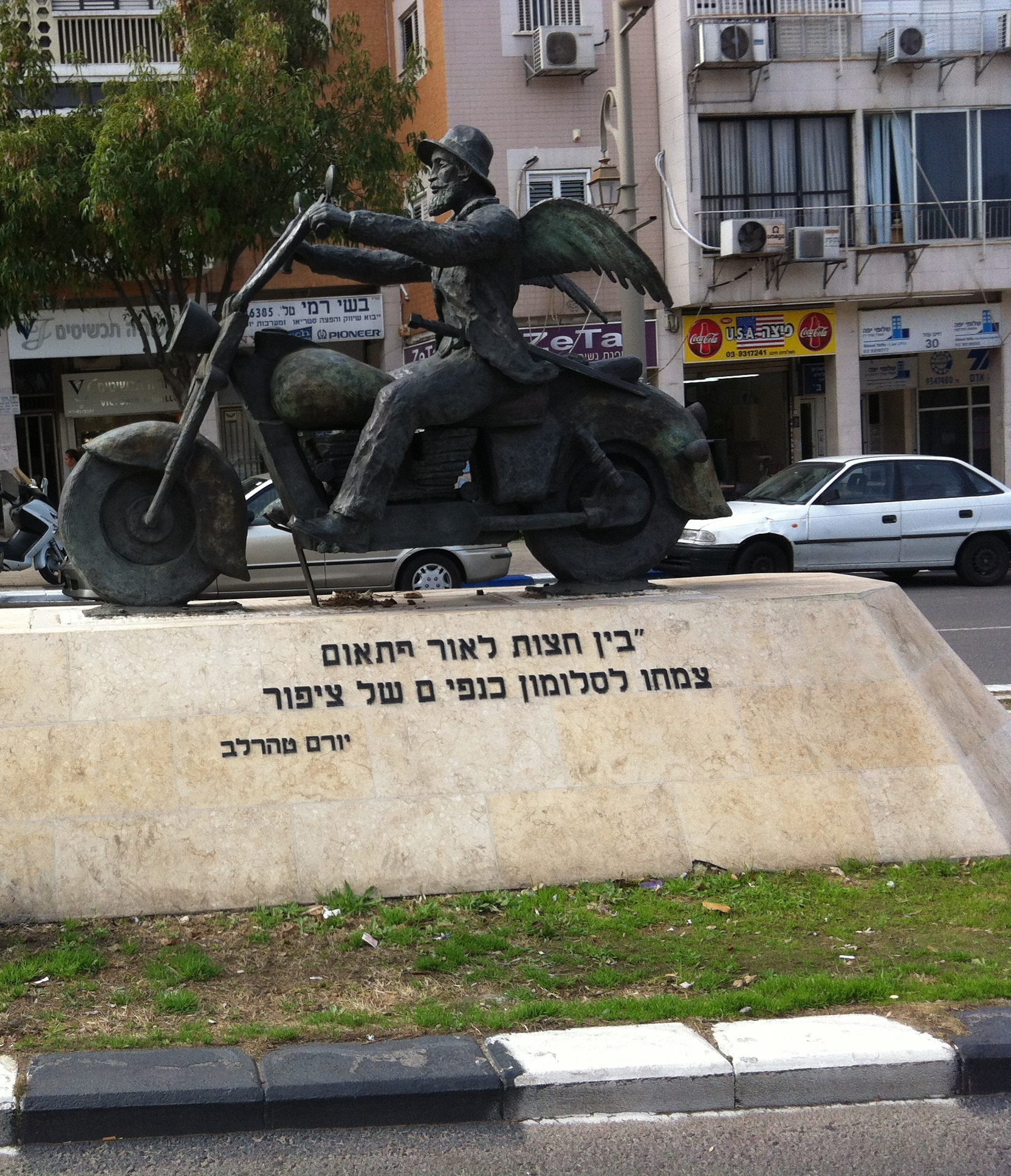 הפסל של יואל משה סלומון בכיכר החמישה בפתח תקווה